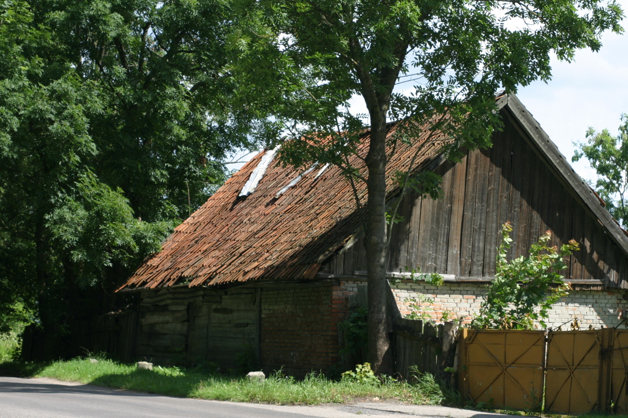 Nakomiady